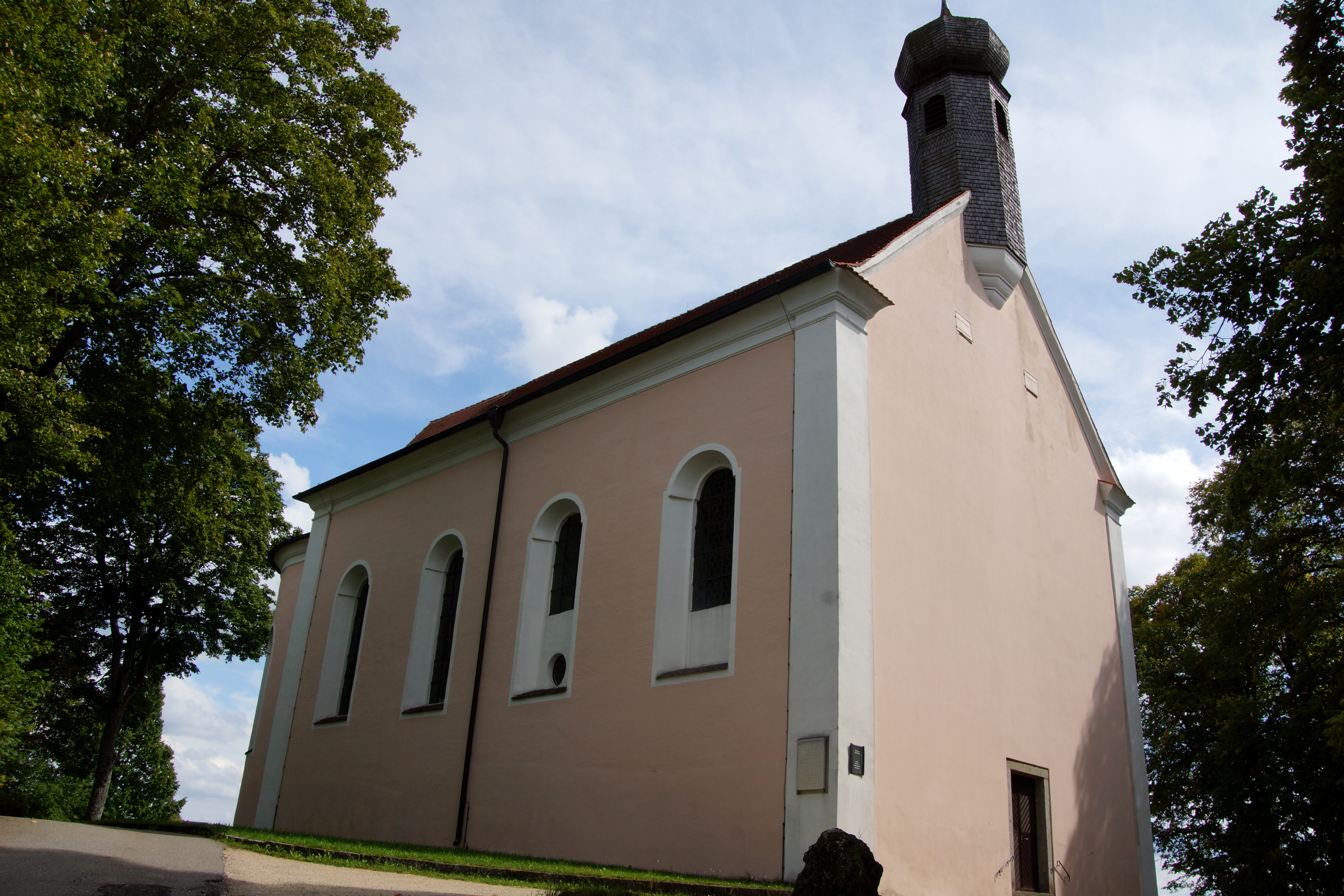 Die katholische Wallfahrtskirche Maria-Hilf im Oberpfälzischen Beratshausen